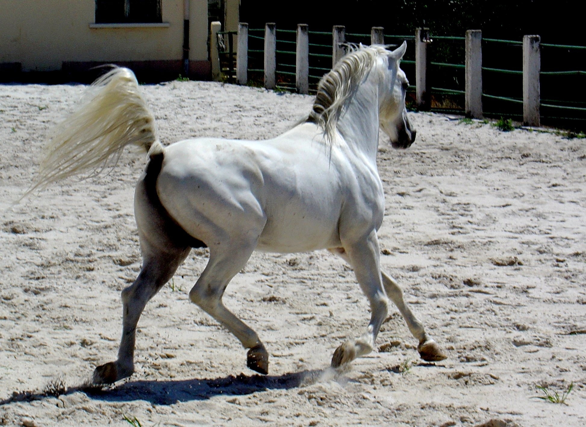 Pur sang arabe élevé au haras "Kabyuk". Ce haras, qui est le plus grand de Bulgarie, a été créé par les Ottomans pour les besoins de l'armée et élevait 1300 chevaux par an.